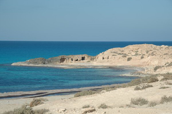 ميناء البريقة القديم بوروم قصر (بوقرادة)